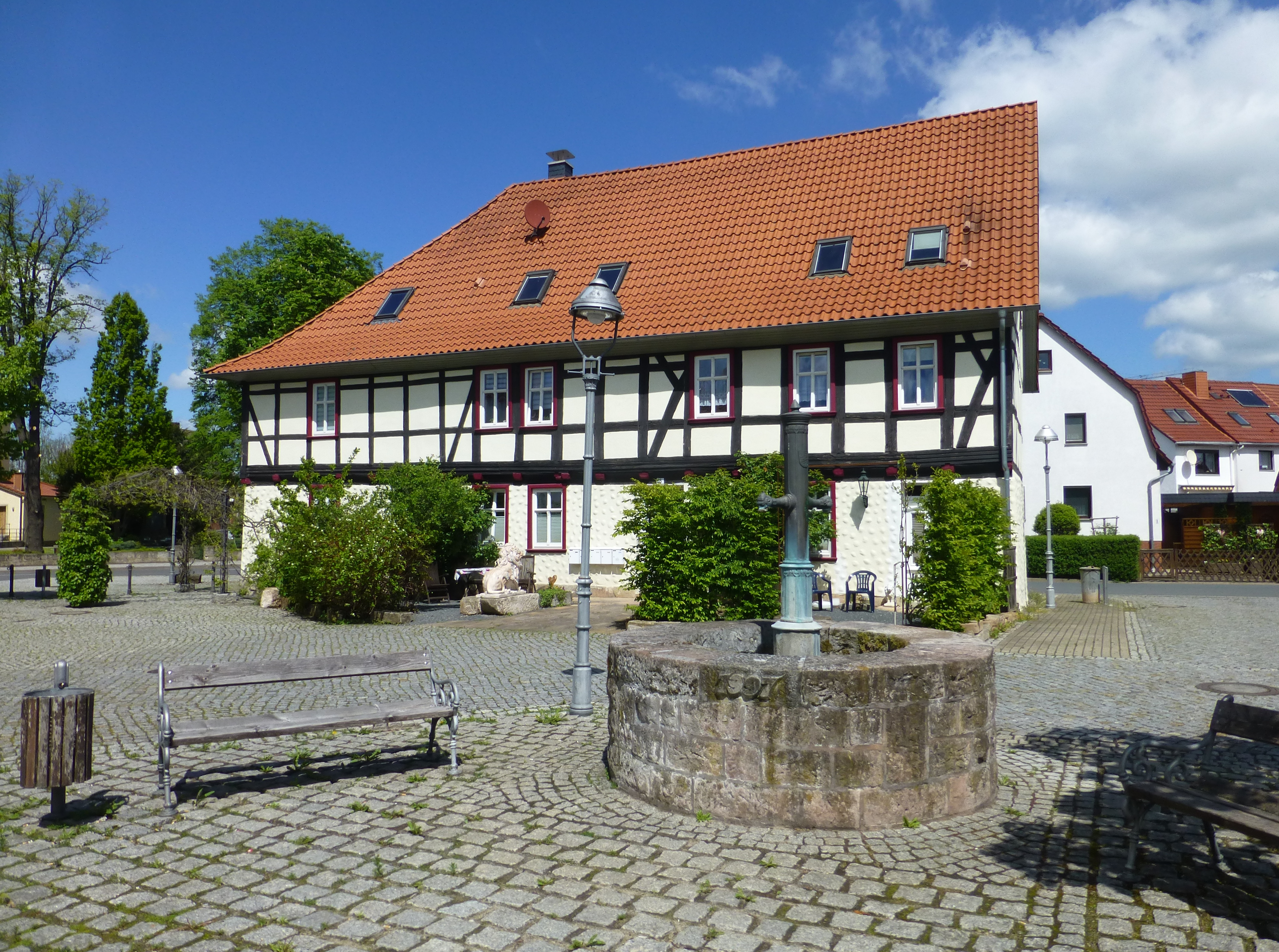 Verbliebenes Gebäude des ehemaligen Unterhofes in Teistungen mit Brunnen